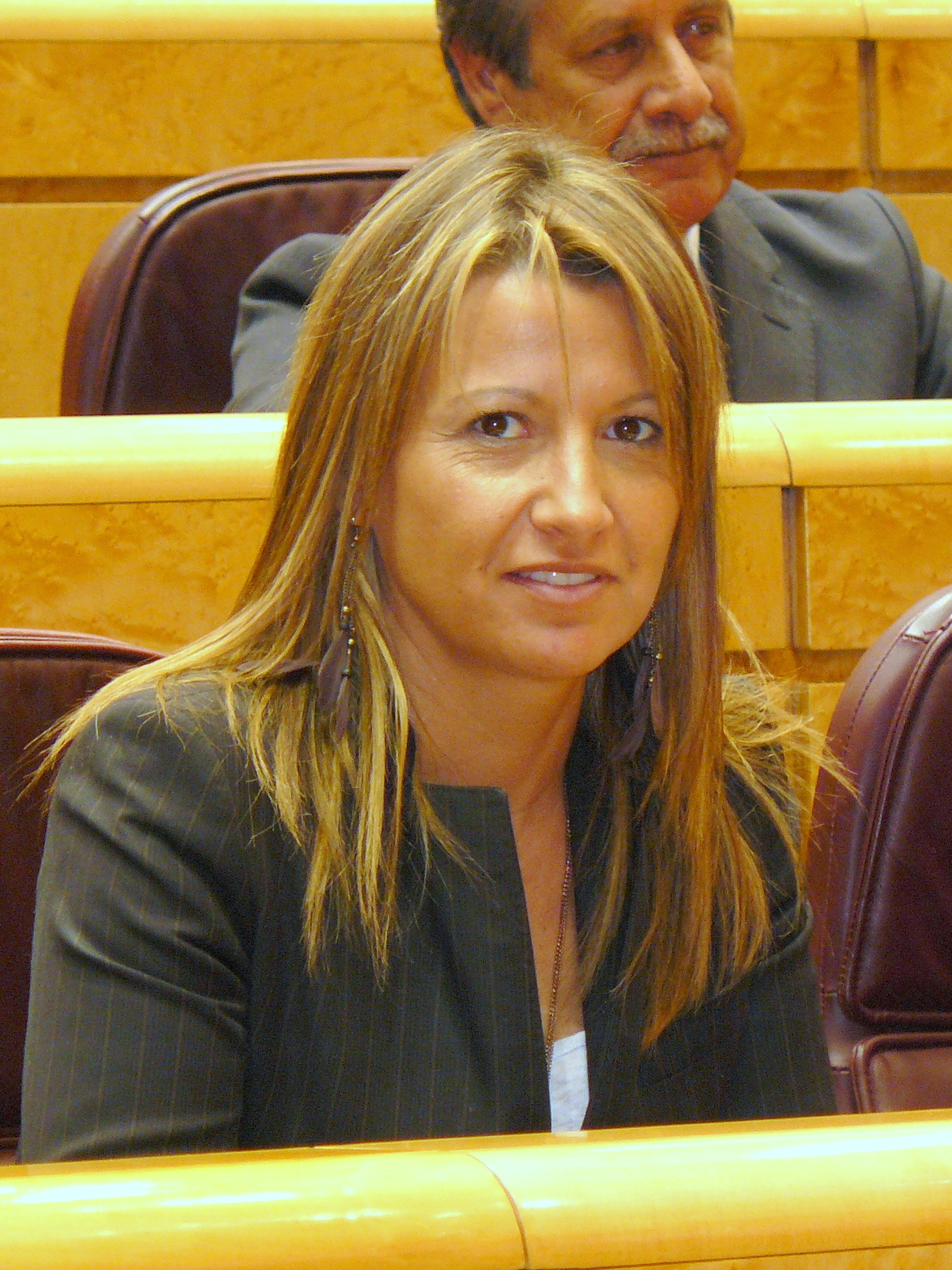 Eva Parera, senadora de CiU